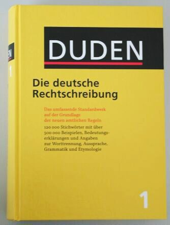 Duden selbst fotografiert